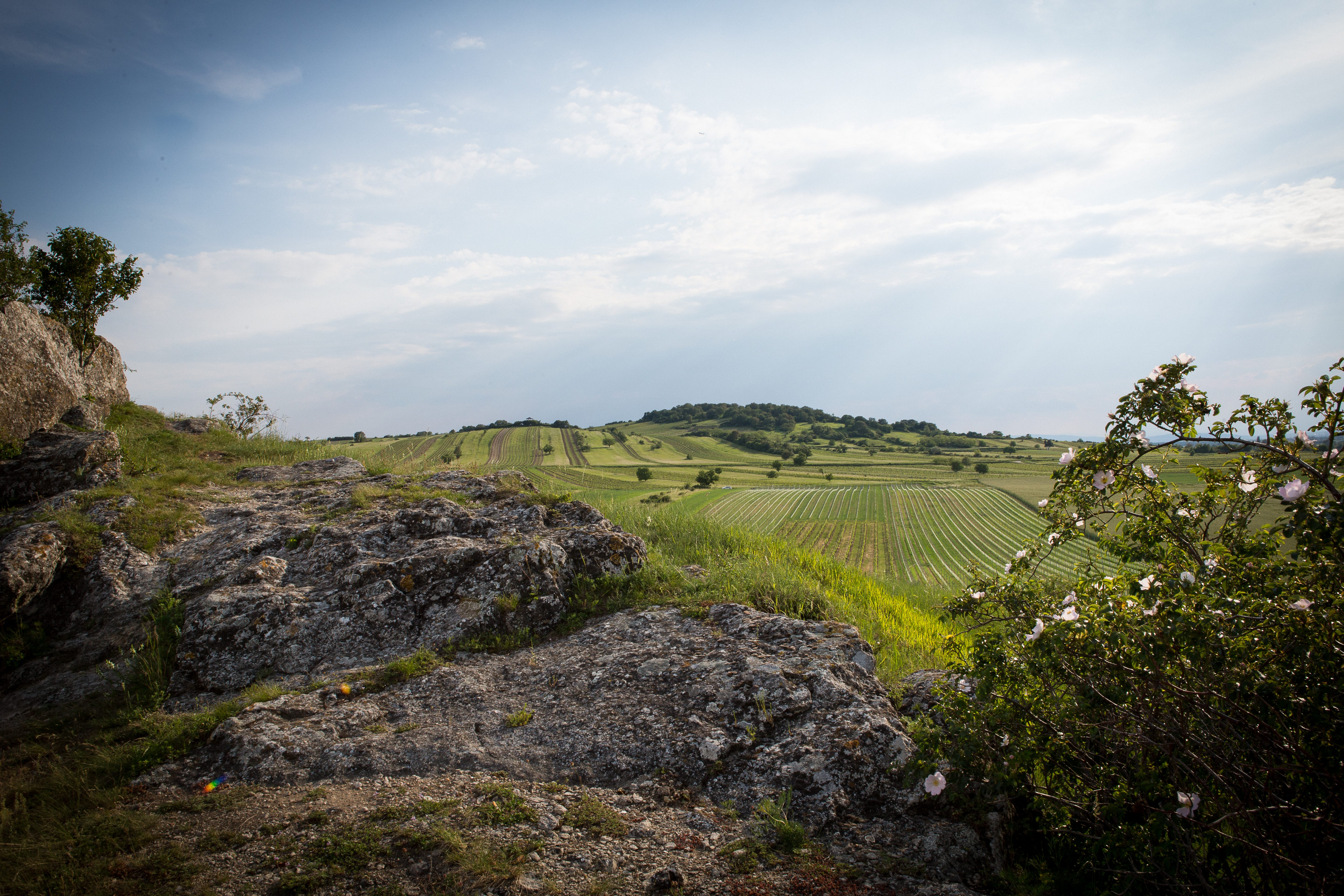 Blick zum Schuetzner Stein